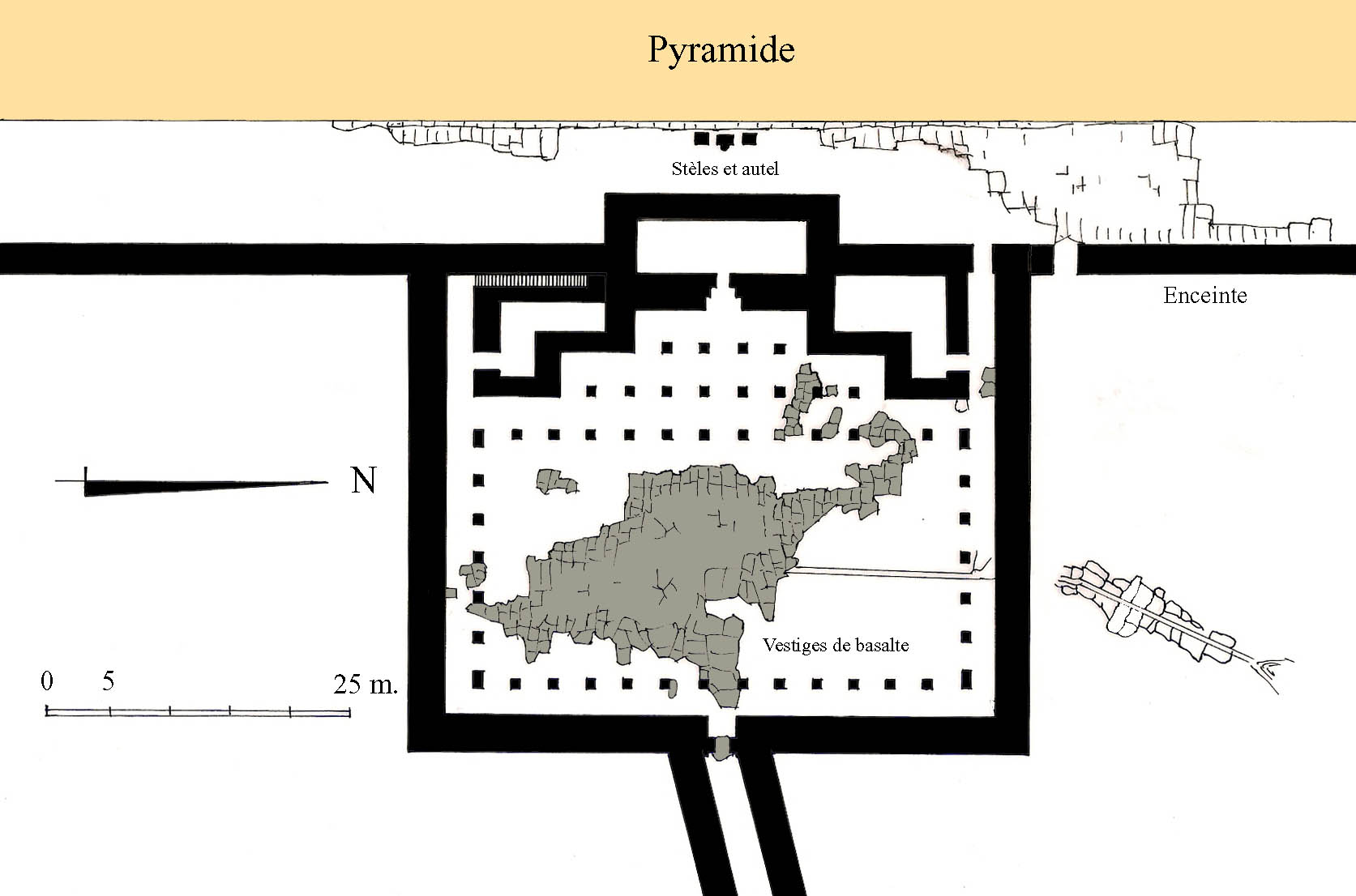 Plan du temple funéraire de Khéops à Gizeh